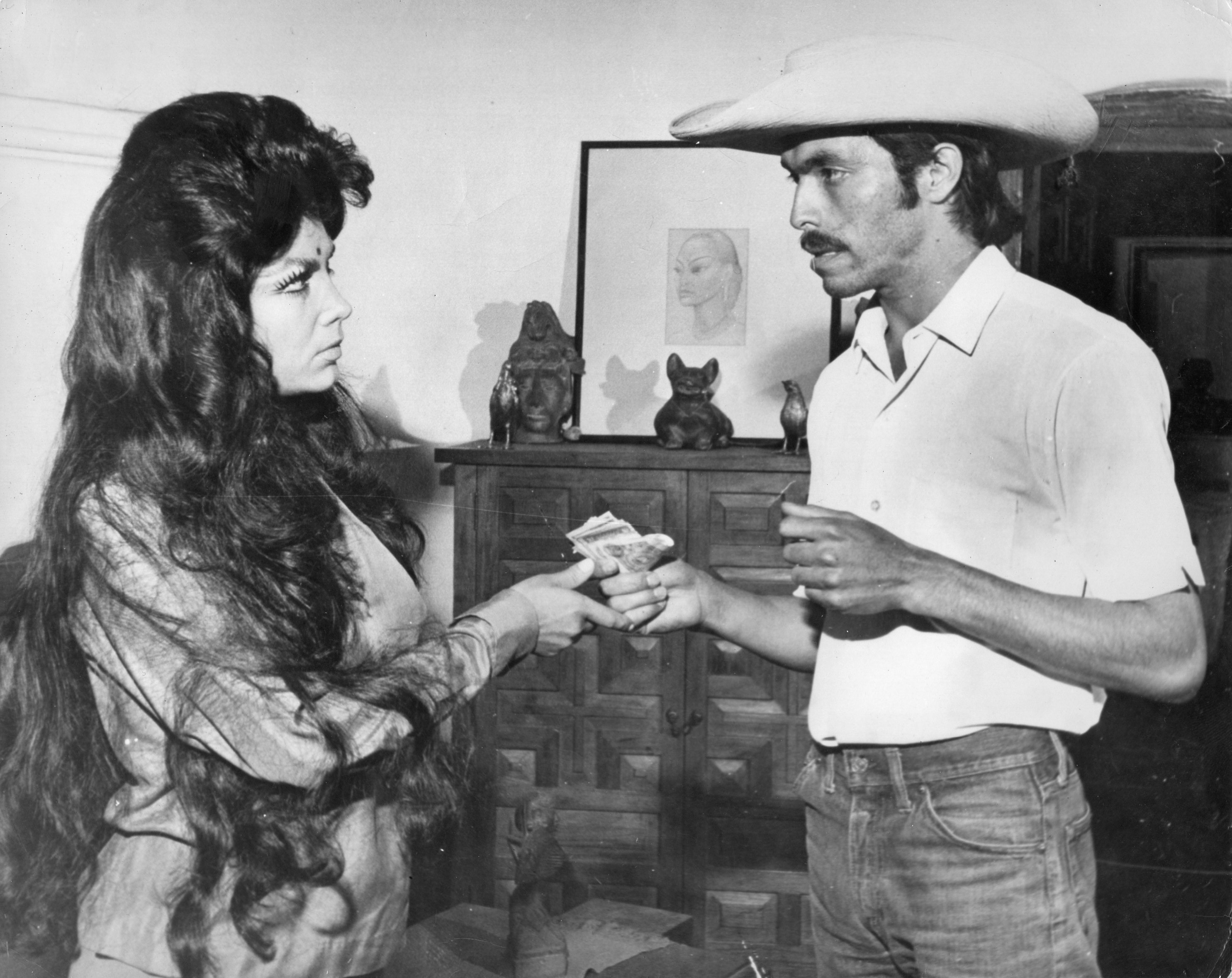 Rigo Camrona y La Tigresa Irma Serrano